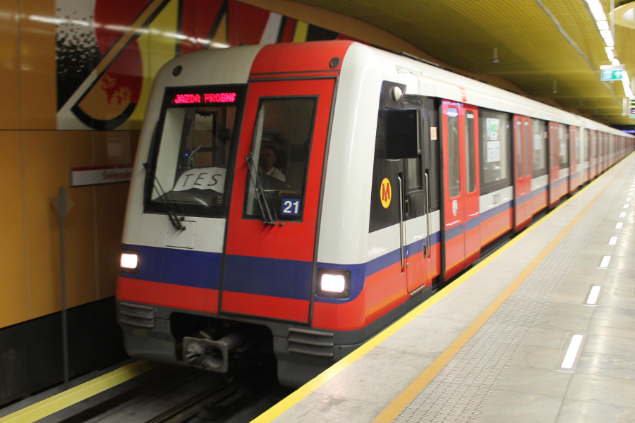 Alstom Metropolis 98B (pociąg nr 21) wjeżdża na stację C11 Świętokrzyska podczas wakacyjnych testów na linii M2 metra w Warszawie.